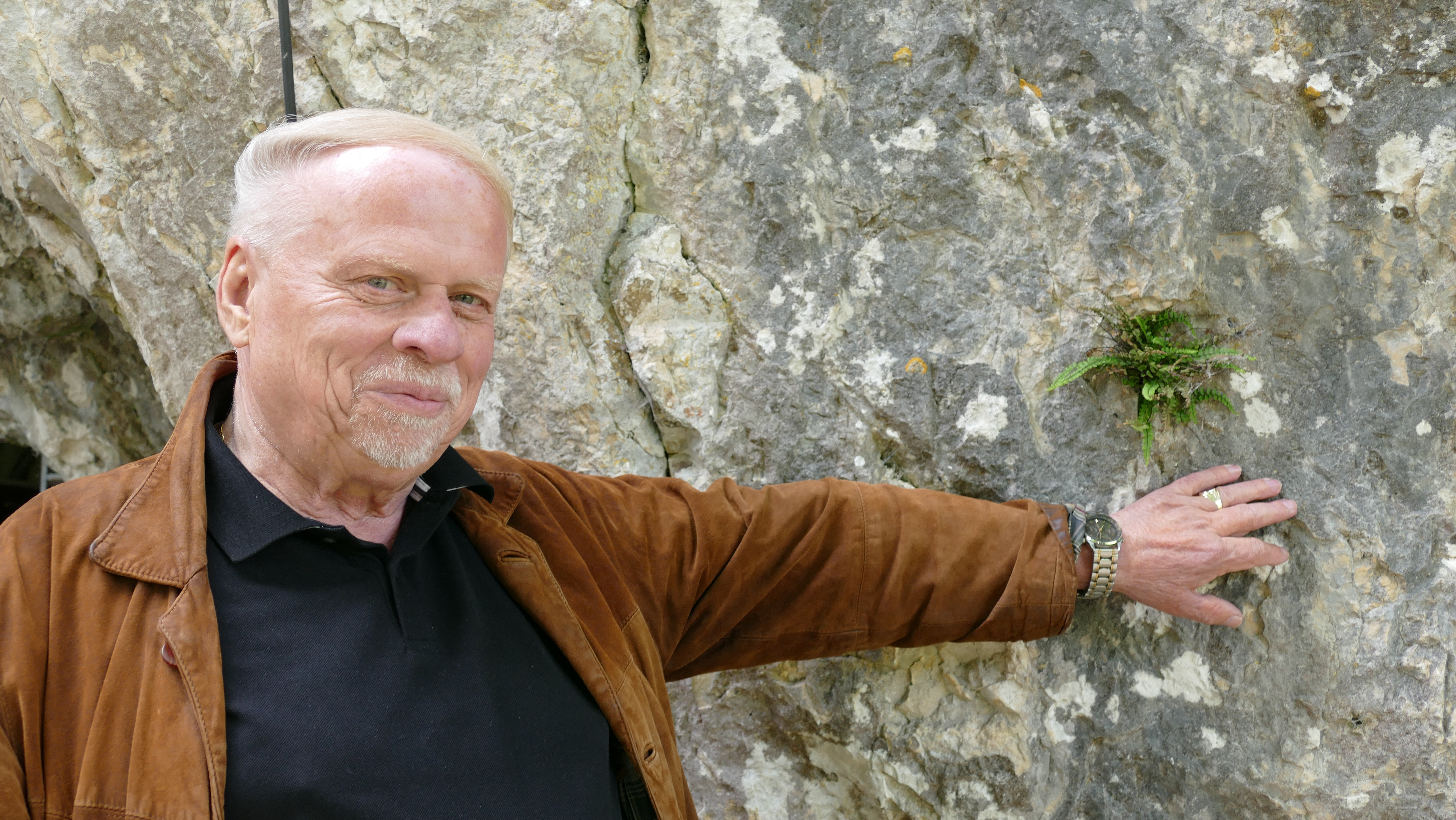 Reiner Blumentritt lenkte das Interesse der Archäologen auf die Eiszeithöhlen des Hohlefels. Die langjährigen Forschungsgrabungen führten zu sensationellen Entdeckungen wie die "Venus vom Hohlefels" und einer "Geierflöte". U. a. wegen dieser Funde wurde der Hohlefels als eine von sechs Höhlen im Ach- und Lonetal in die Liste des UNESCO Welterbes aufgenommen.